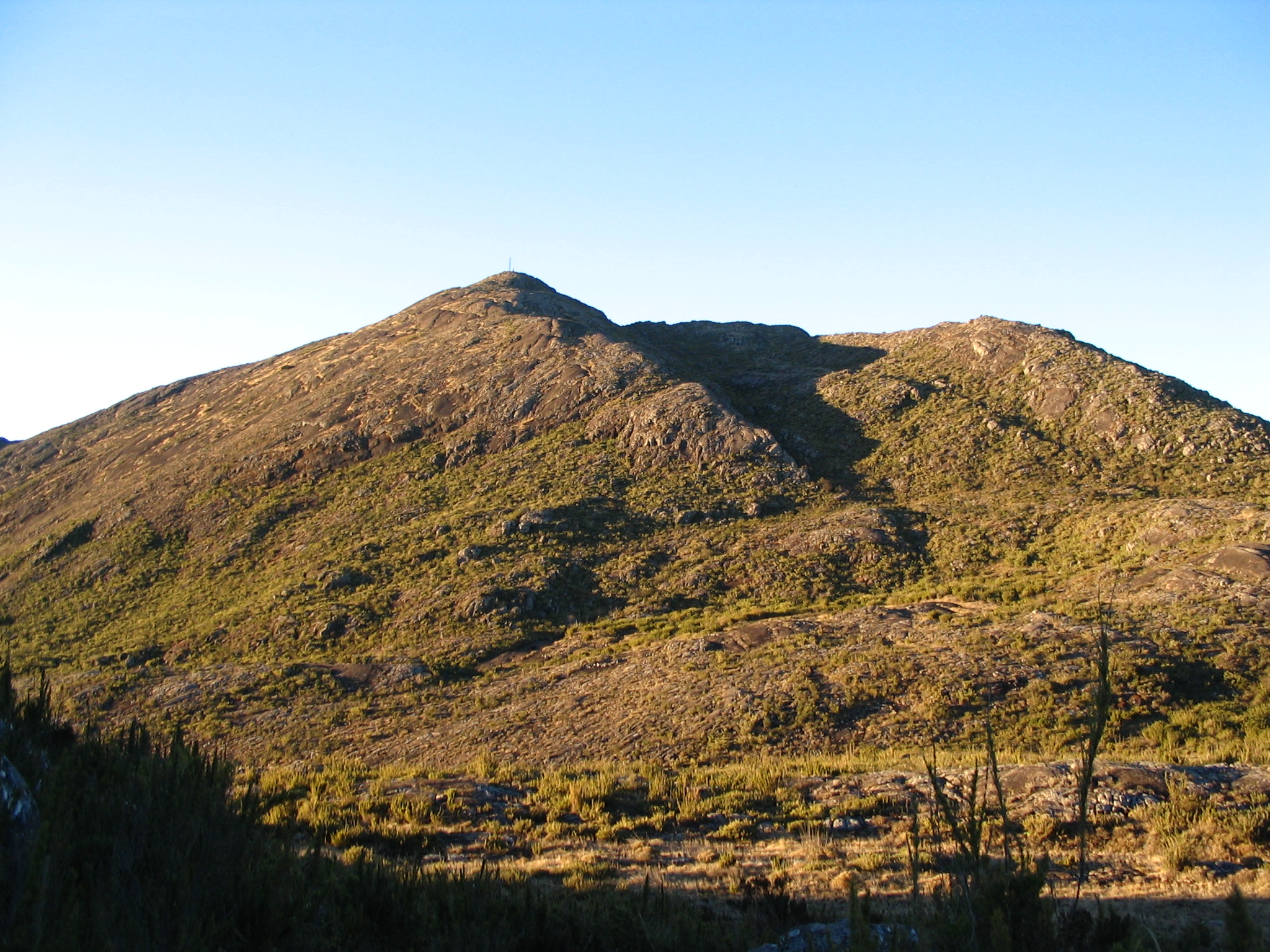 Pico da Bandeira - Parque Nacional do Caparaó - Minas Gerais/Espírito Santo - Brasil. Foto de Alex Hubner em 27/07/2006 - 7h50 - Temp. Externa: 5 graus centígrados abaixo de zero - Vento: zero.